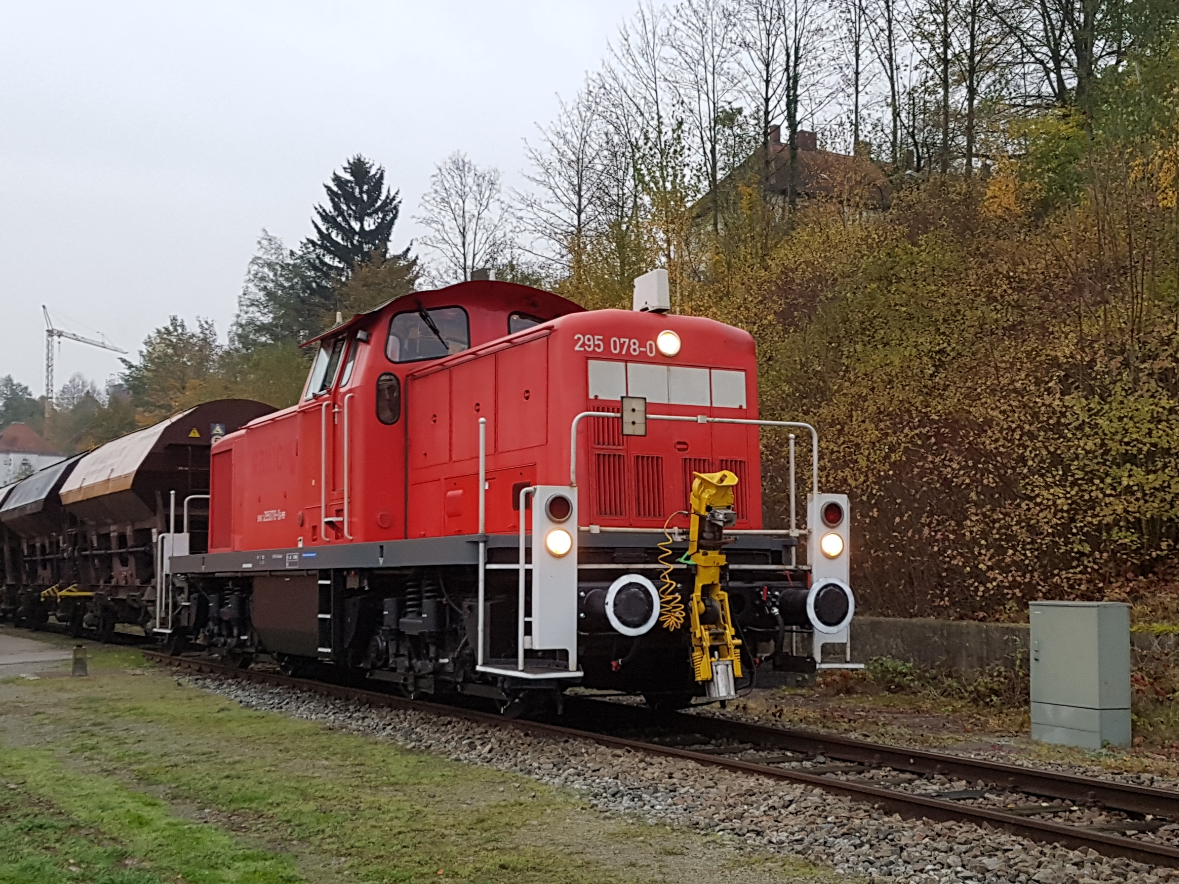 Baureihe 295 078-0 der Passauer Eisenbahnfreunde auf dem vereinseigenen Gelände